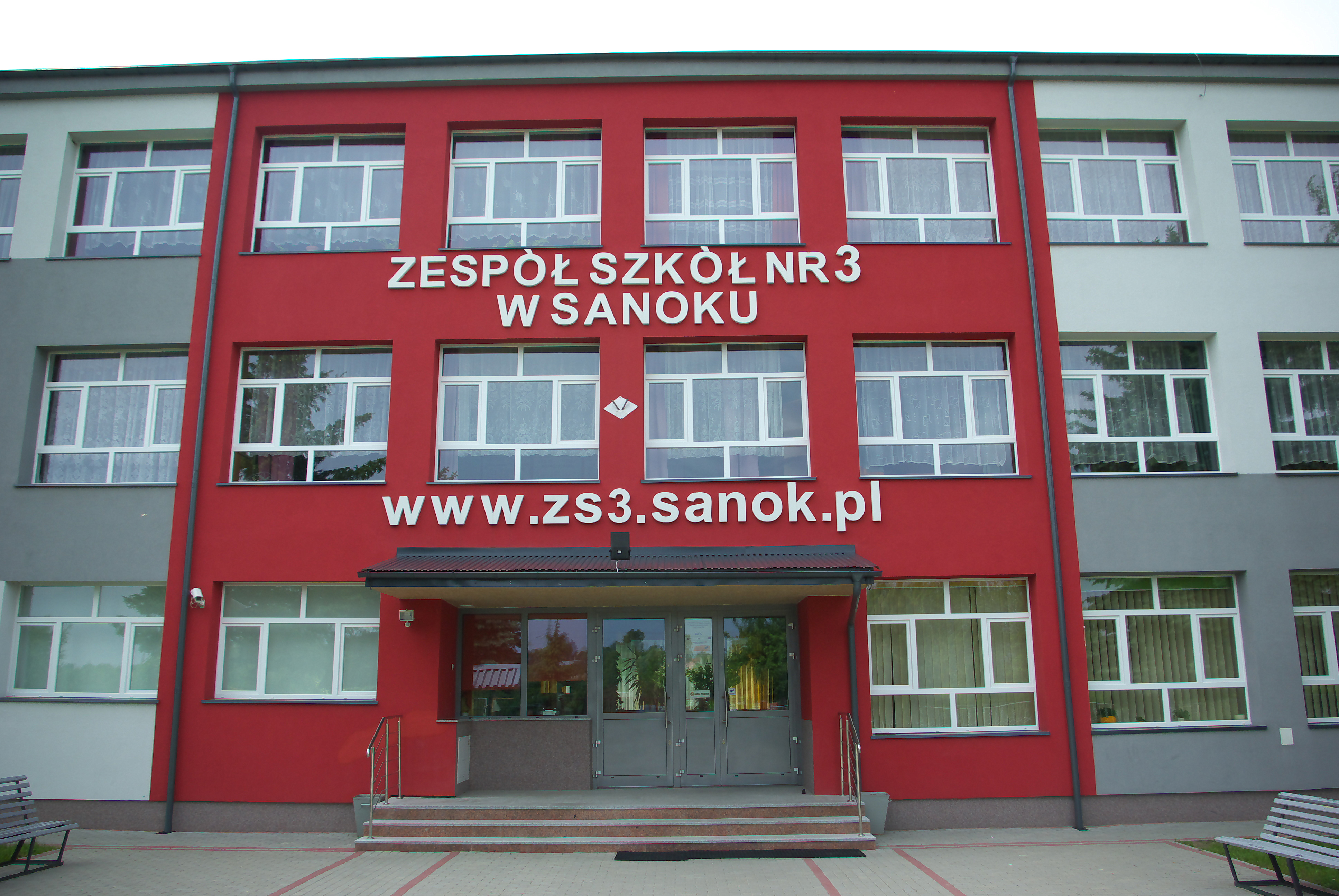 Zespół Szkół nr 3 im. Walentego Lipińskiego i Mateusza Beksińskiego w Sanoku